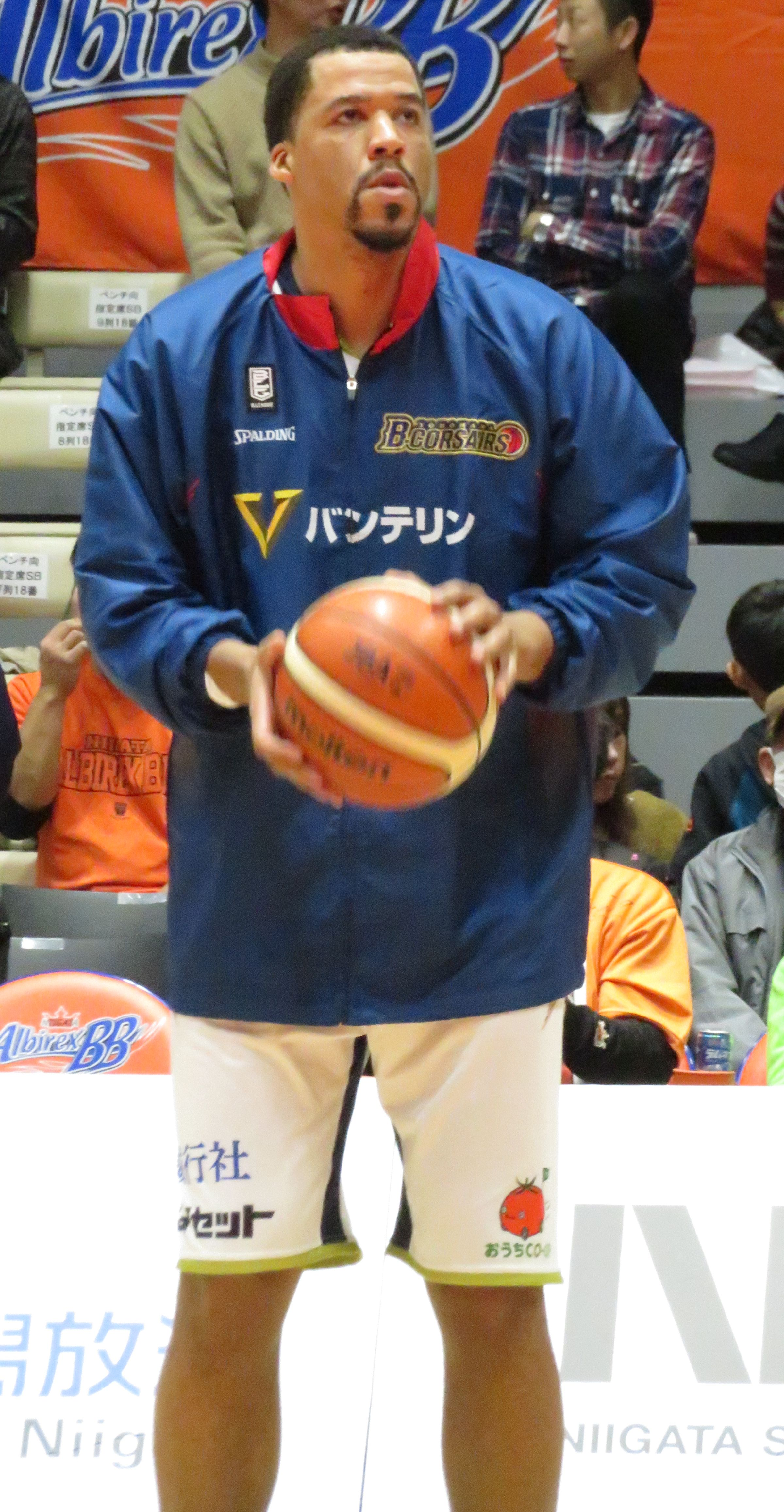 2018年12月26日 2018-19 B1 第16節 新潟-横浜 シティホールプラザアオーレ長岡